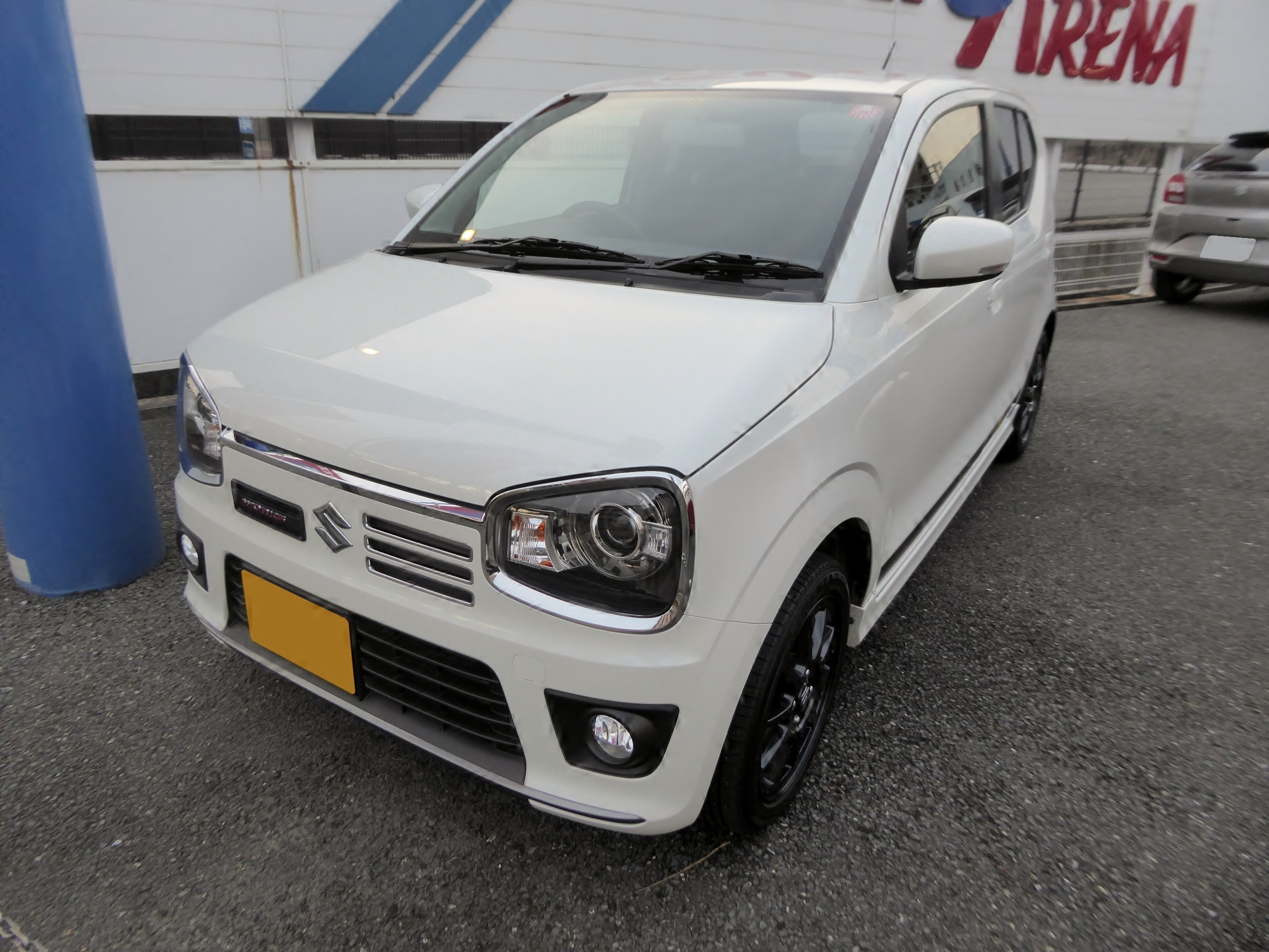 DBA-HA36S型スズキ・アルトワークスをフロントから撮影。